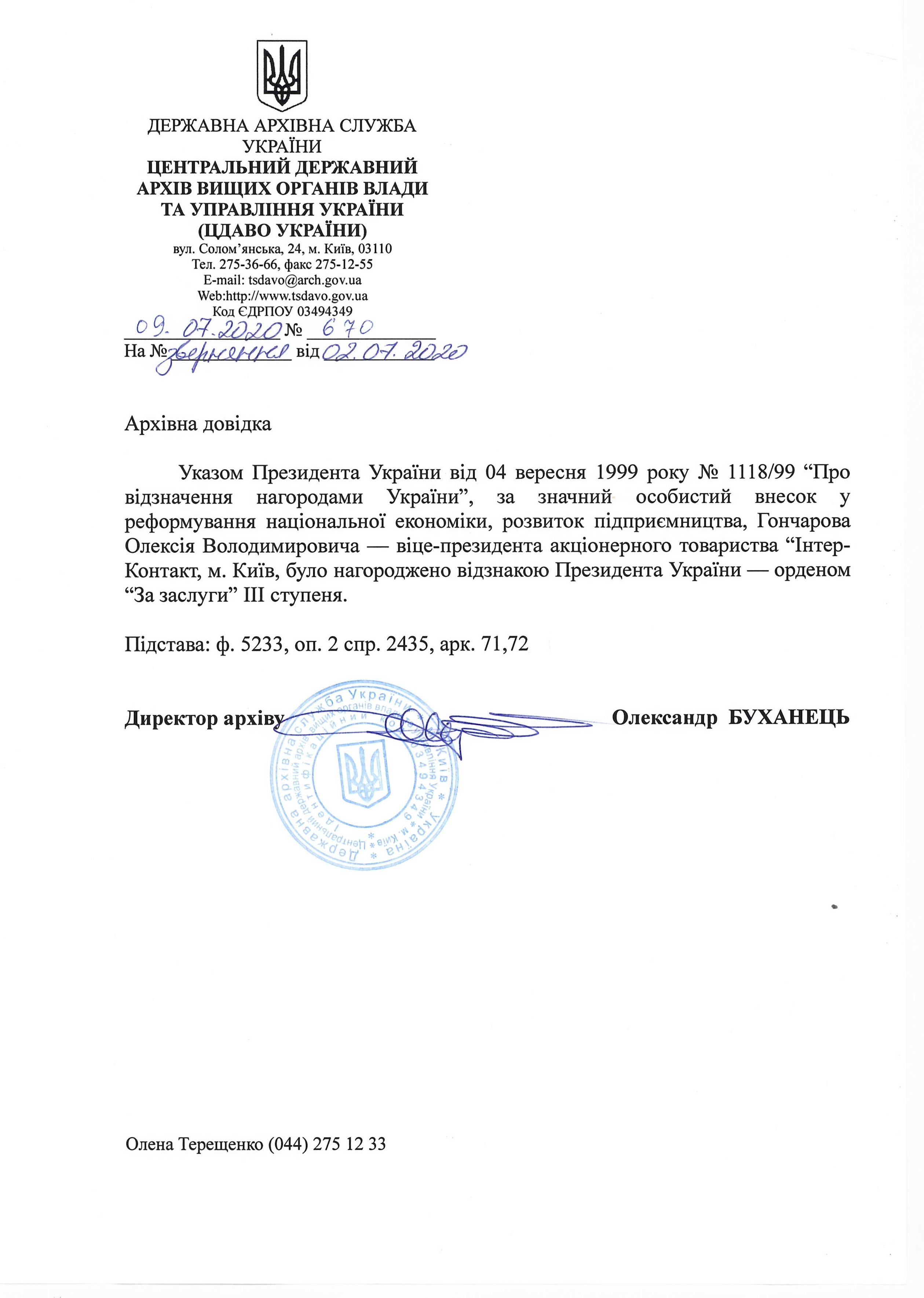 Указ Президента про нагородження Гончарова Олексія